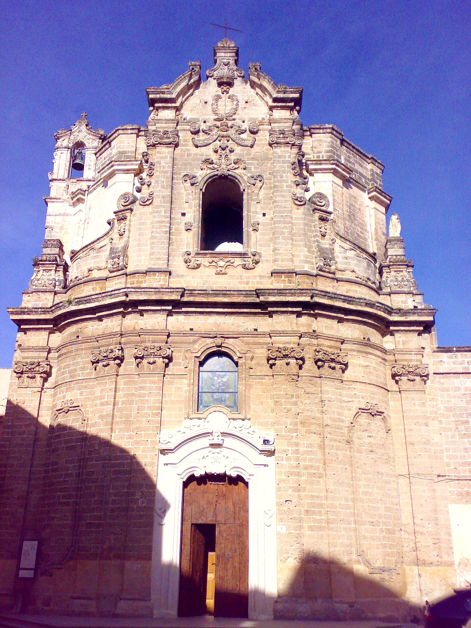 Chiesa di San Giuseppe Nardò